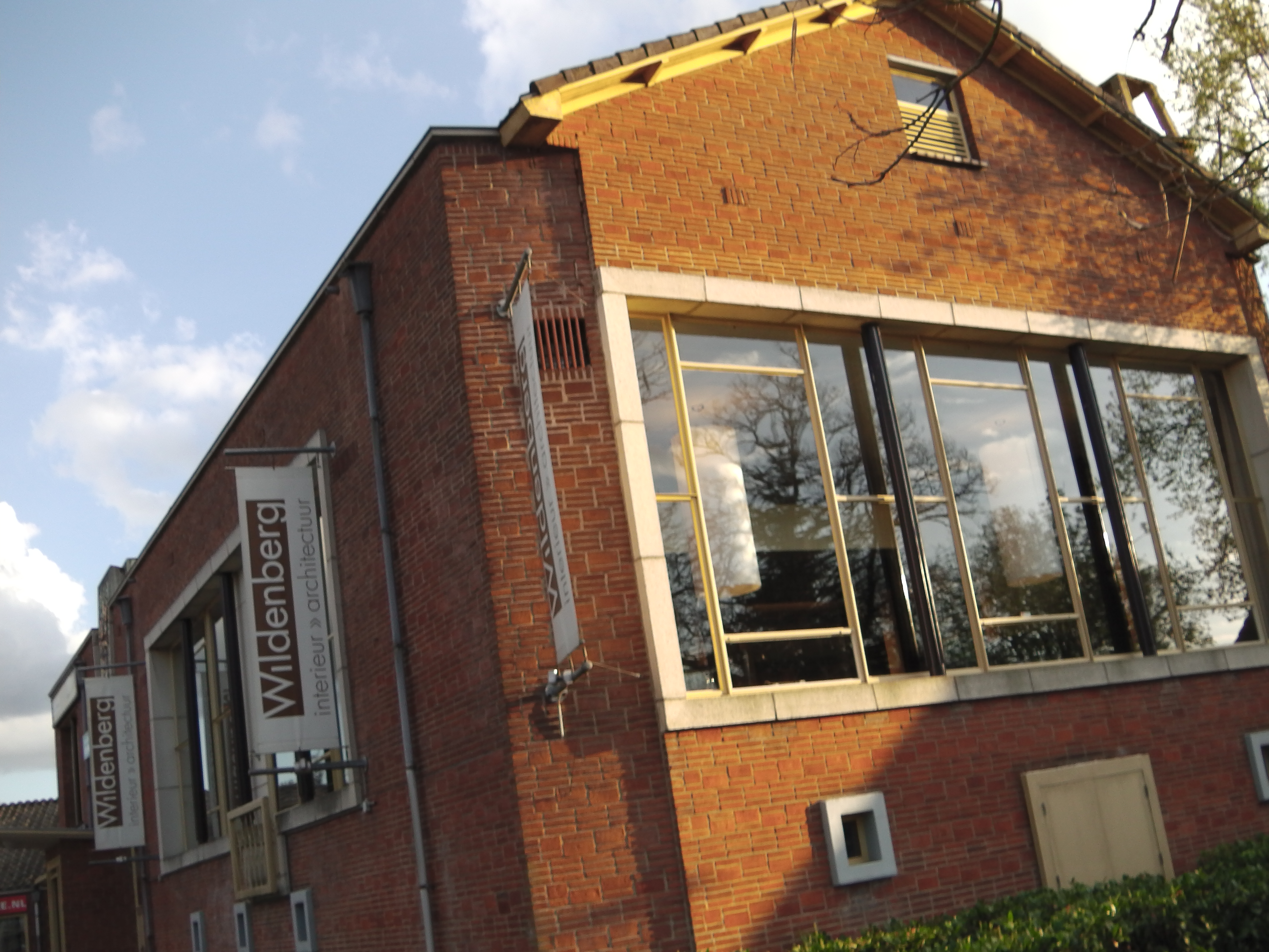 Het voormalig gemeentehuis van Leusden dat dateert uit 1956